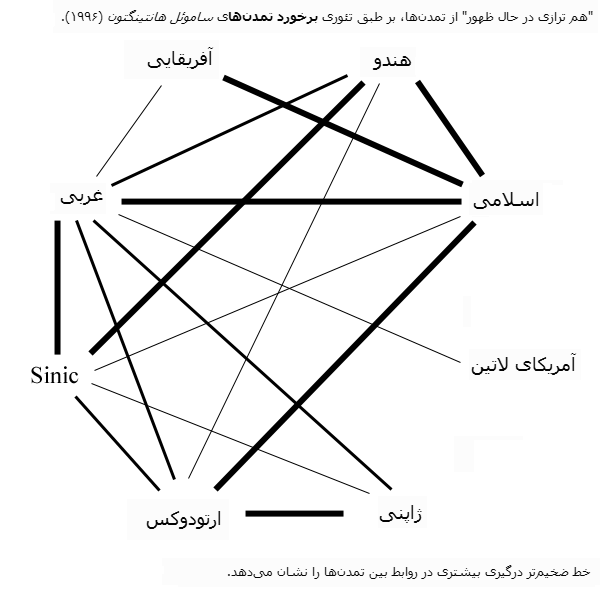 نمودار نظریهٔ برخورد تمدن‌ها که توسط ساموئل هانتینگتون ارائه شده‌است.